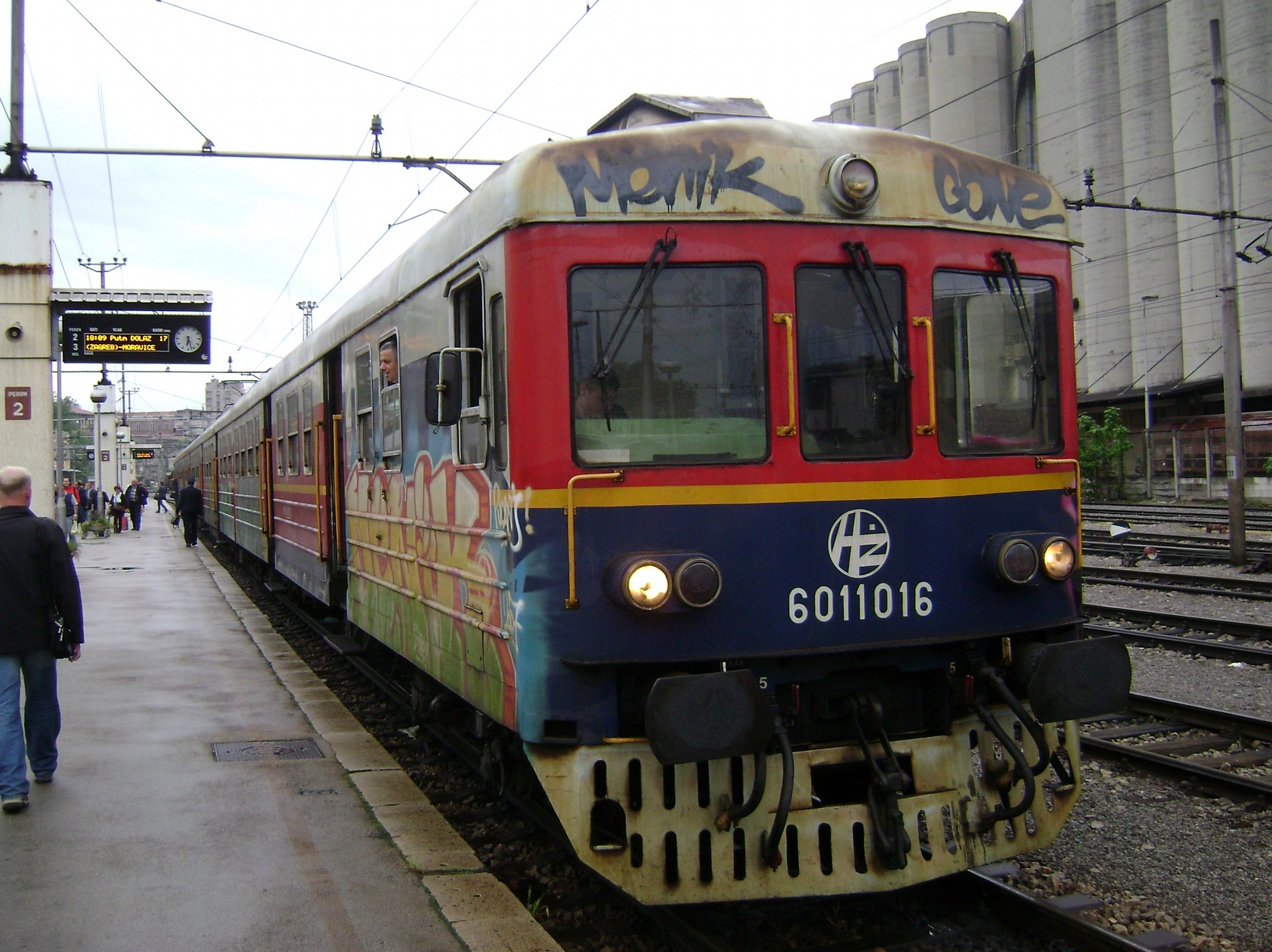 A HŽ 6011 series EMU in Rijeka, Croatia